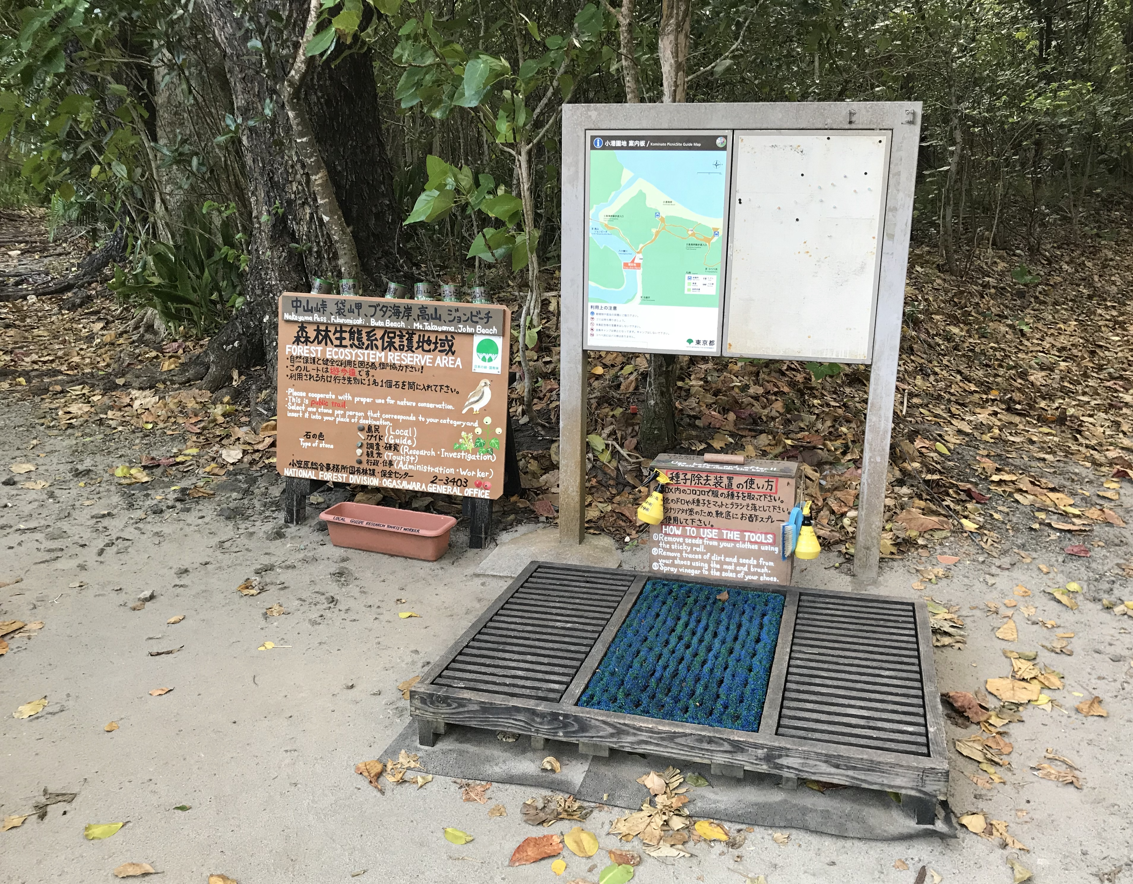 父島森林生態系保護地区前の種子除去マット